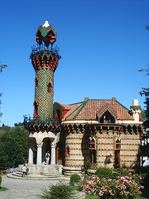 Capricho de Gaudí, de finales del siglo XIX